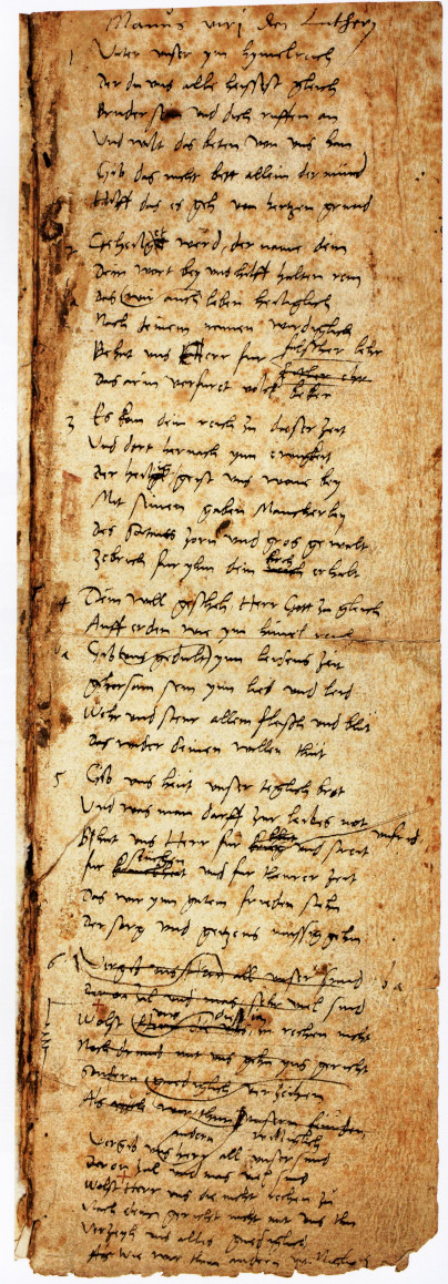 Autograph Martin Luthers, Das Vaterunser-Lied. Einer von wenigen Chorälen von Martin Luther. Auf der zweiten Seite ist die einzige, bekannte Notenschrift von Martin Luther. Von ihm selbst wieder verworfen.